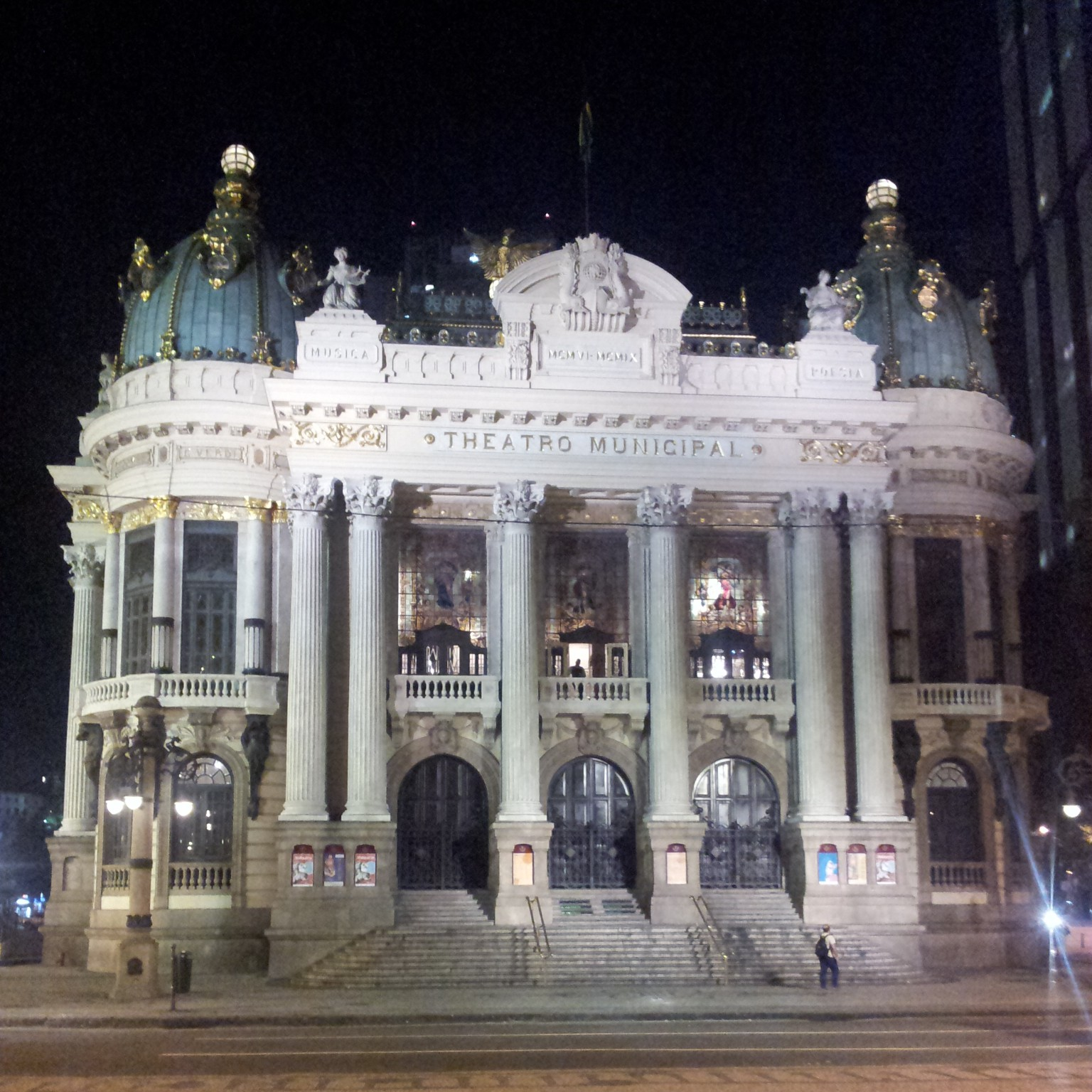 Teatro Municipal da cidade do Rio de Janeiro